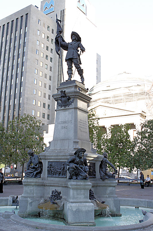 Photo du monument à Maisonneuve